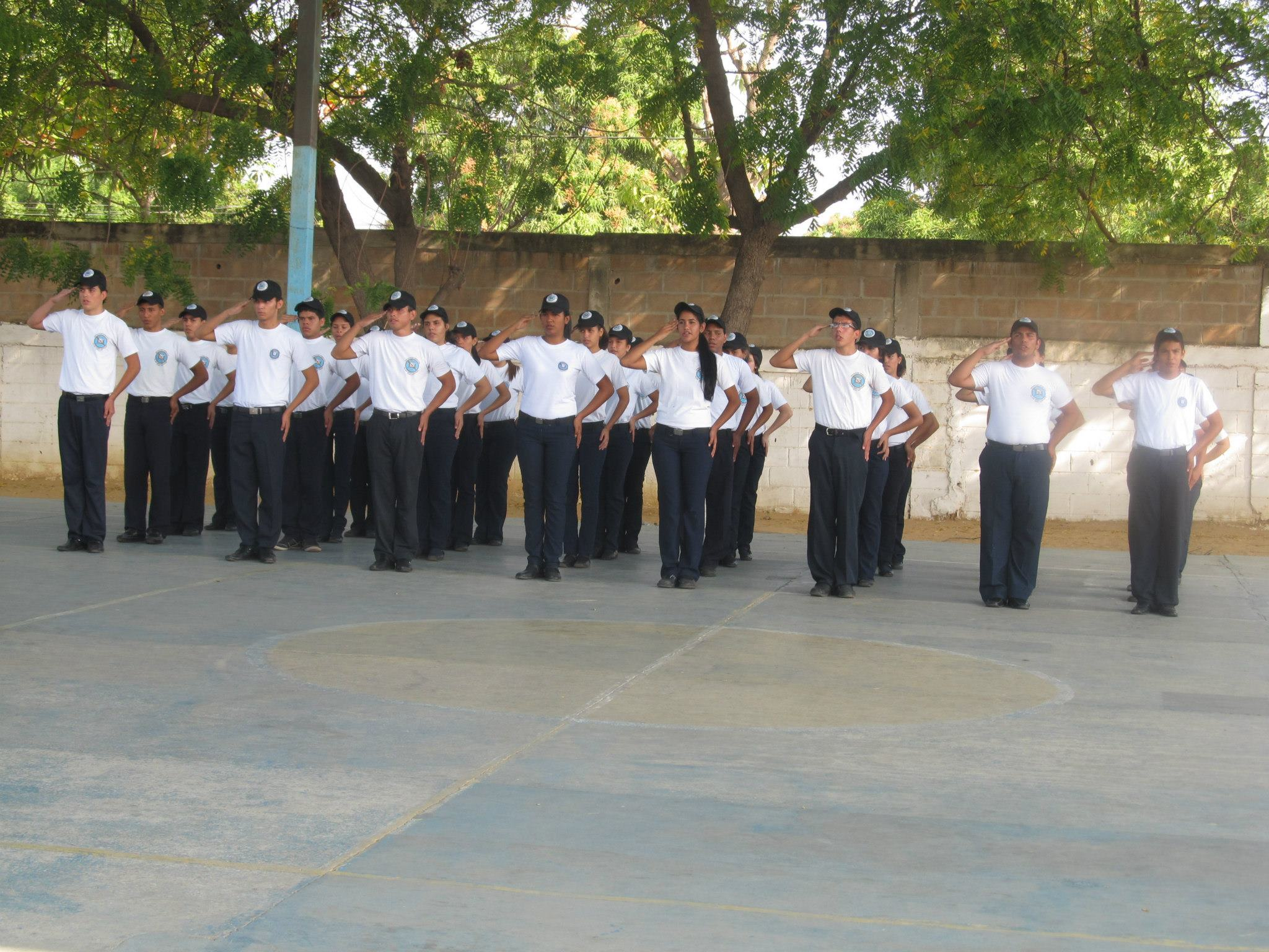 Estudiantes de la U.E. Arq. Manolo Muchacho, practicando 'Orden Cerrado' de la cátedra Instrucción Premilitar, en Maracaibo (estado Zulia), Venezuela